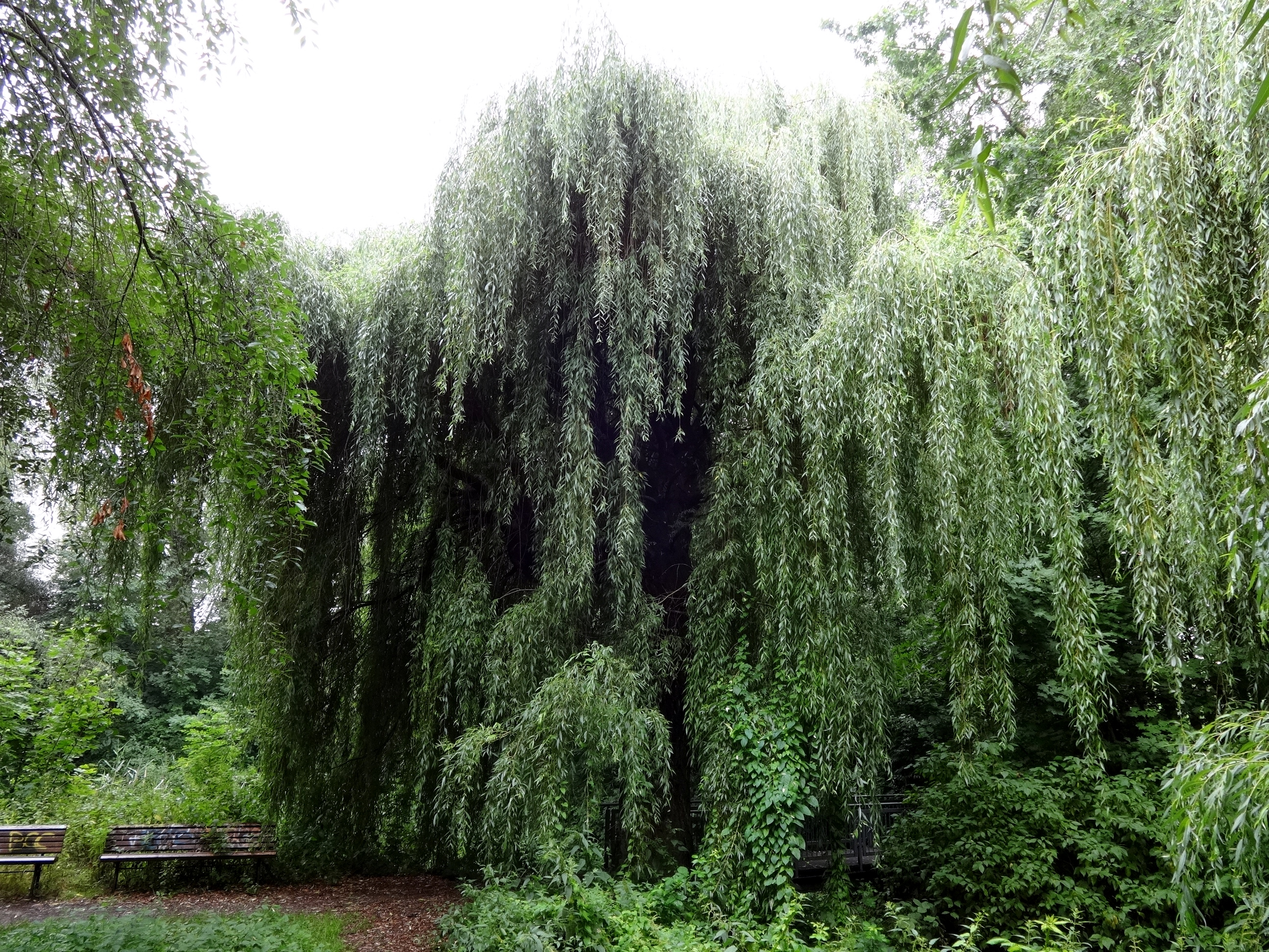 Waldowpark in Berlin-Mahlsdorf, benannt nach Wilhelm von Waldow (1856–1937), einem preußischen Staatsbeamten Der Park entstand Anfang des 20. Jahrhunderts auf Initiative eines Mahlsdorfer Gutsbesitzers, der nach dem Krieg enteignet wurde. Eine LPG baute hier Kartoffeln an. Seit den 1990er Jahren ist der Park als Naherholungsgebiet wieder nutzbar.